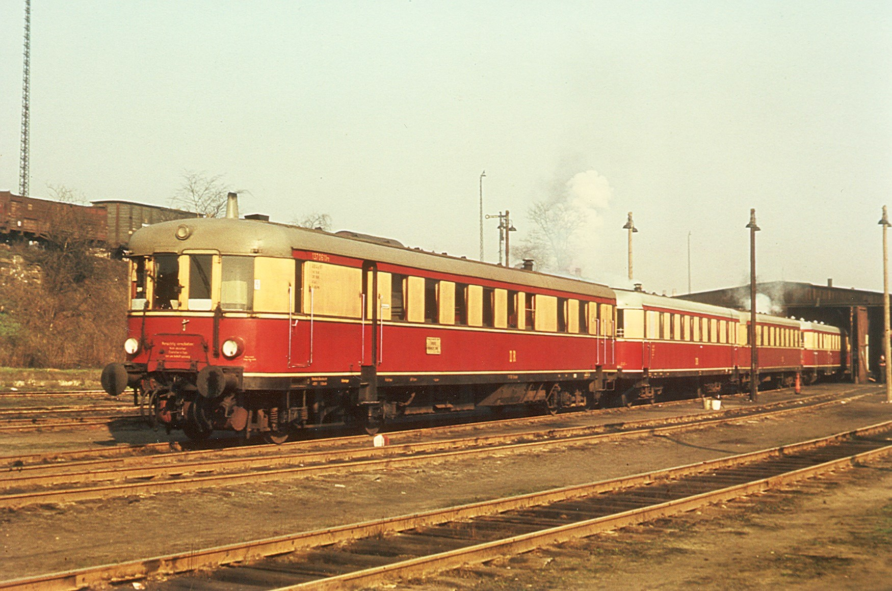 Triebwagenzug des Zittauer Eilzuges im Bahnbetriebswerk Dresden-Pieschen, aufgenommen von Georg Otte